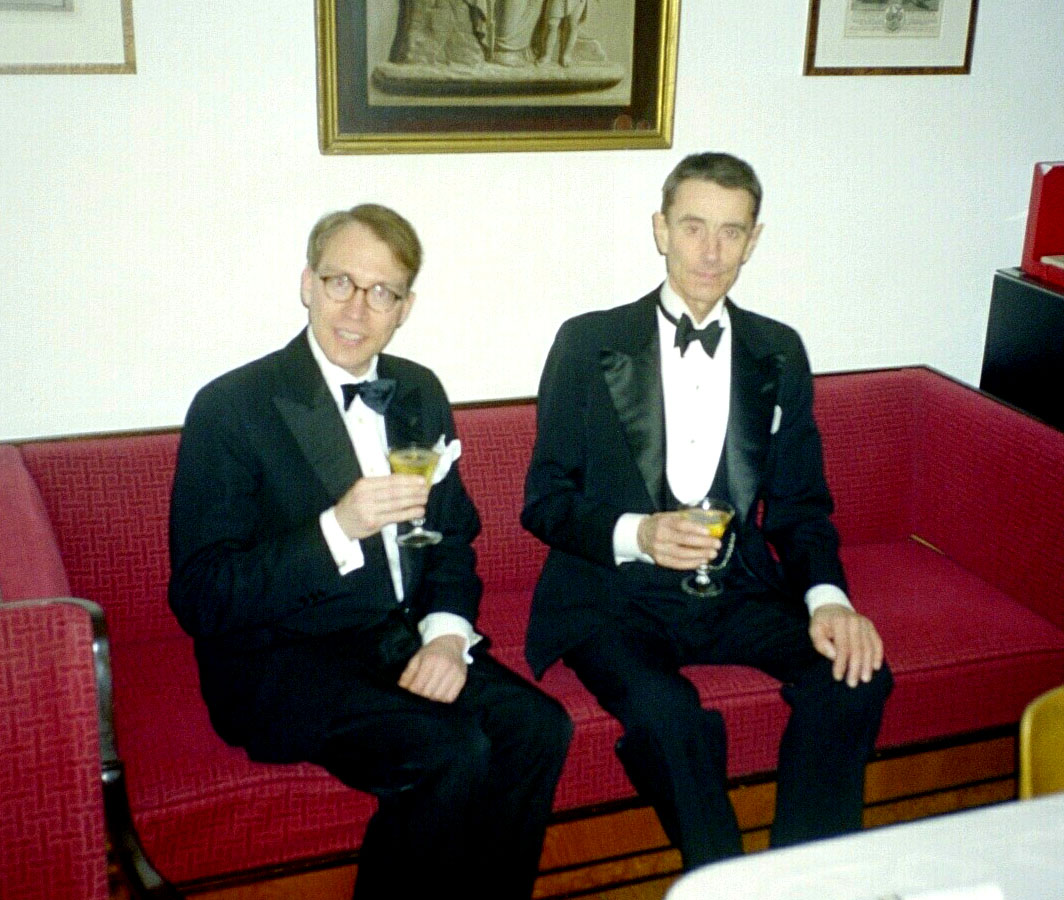 Two Swedish gentlemen wearing black tie, Lund, Sweden, 2004.